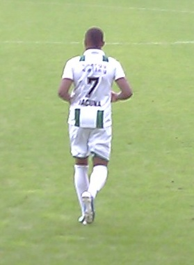 Leandro Bacuna in 2011